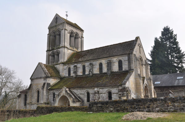 Lierval - Eglise de la Nativité de la Sainte Vierge